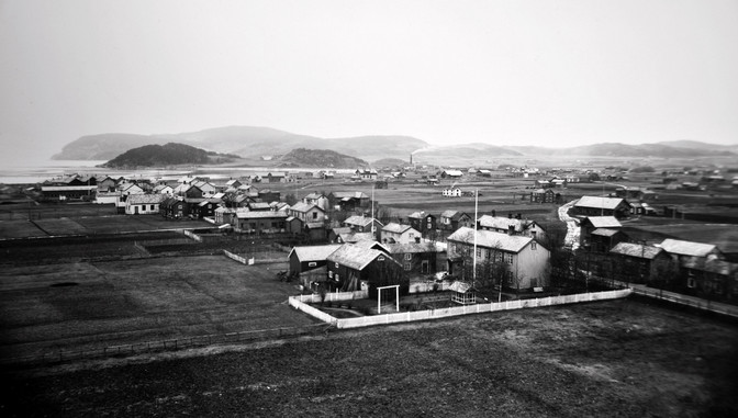 Stjørdalshalsen rundt forrige århundreskifte. Bernhard Øverlands «Øysletten» i forgrunnen.